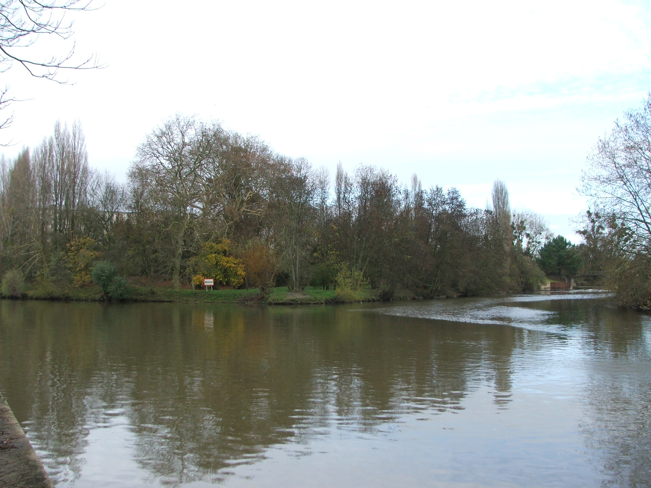 Confluence de l'Huisne (à droite) dans la Sarthe (à gauche).